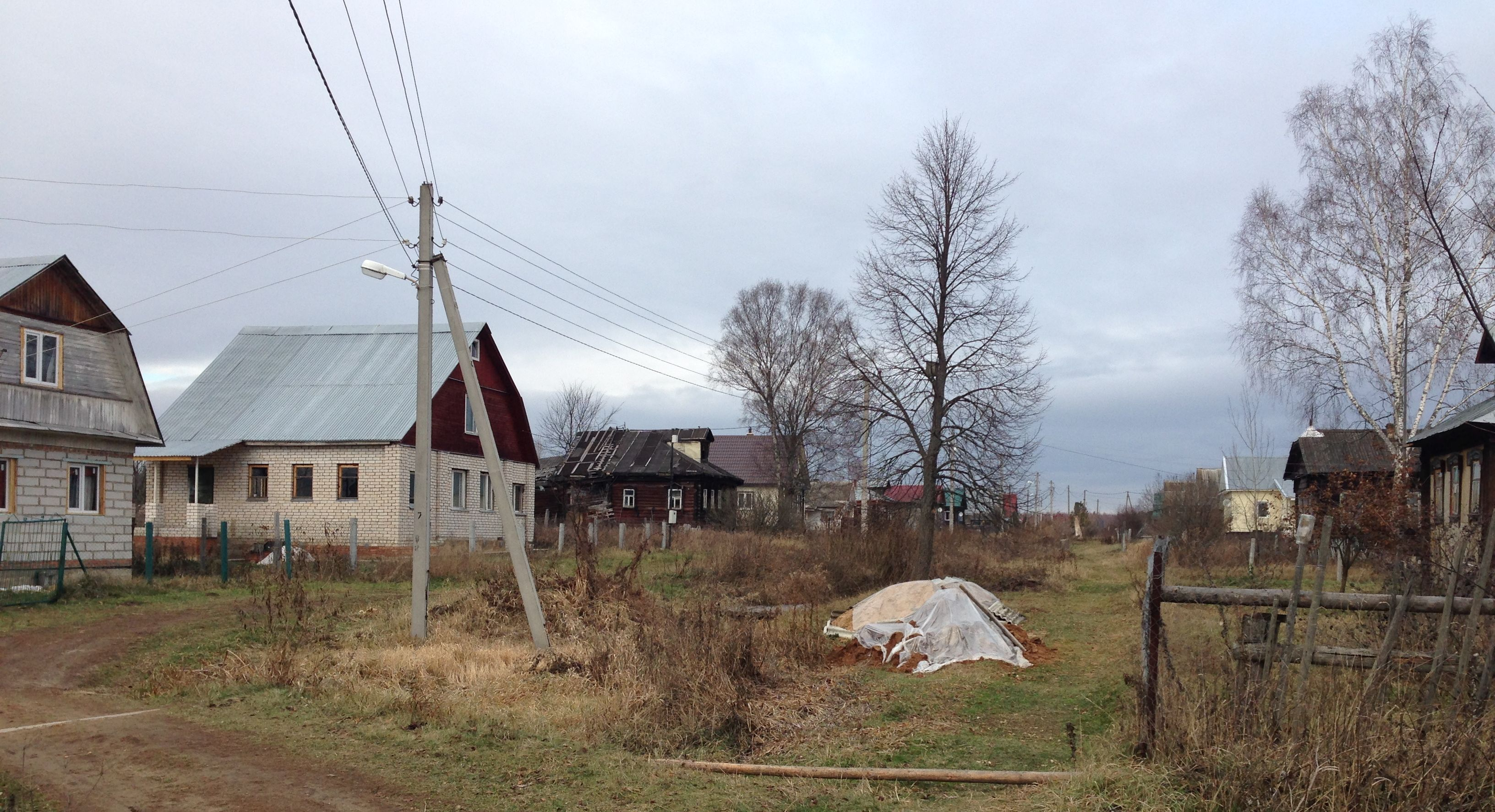 Деревня Троица-Вязники (Талдомский район, Московская область).